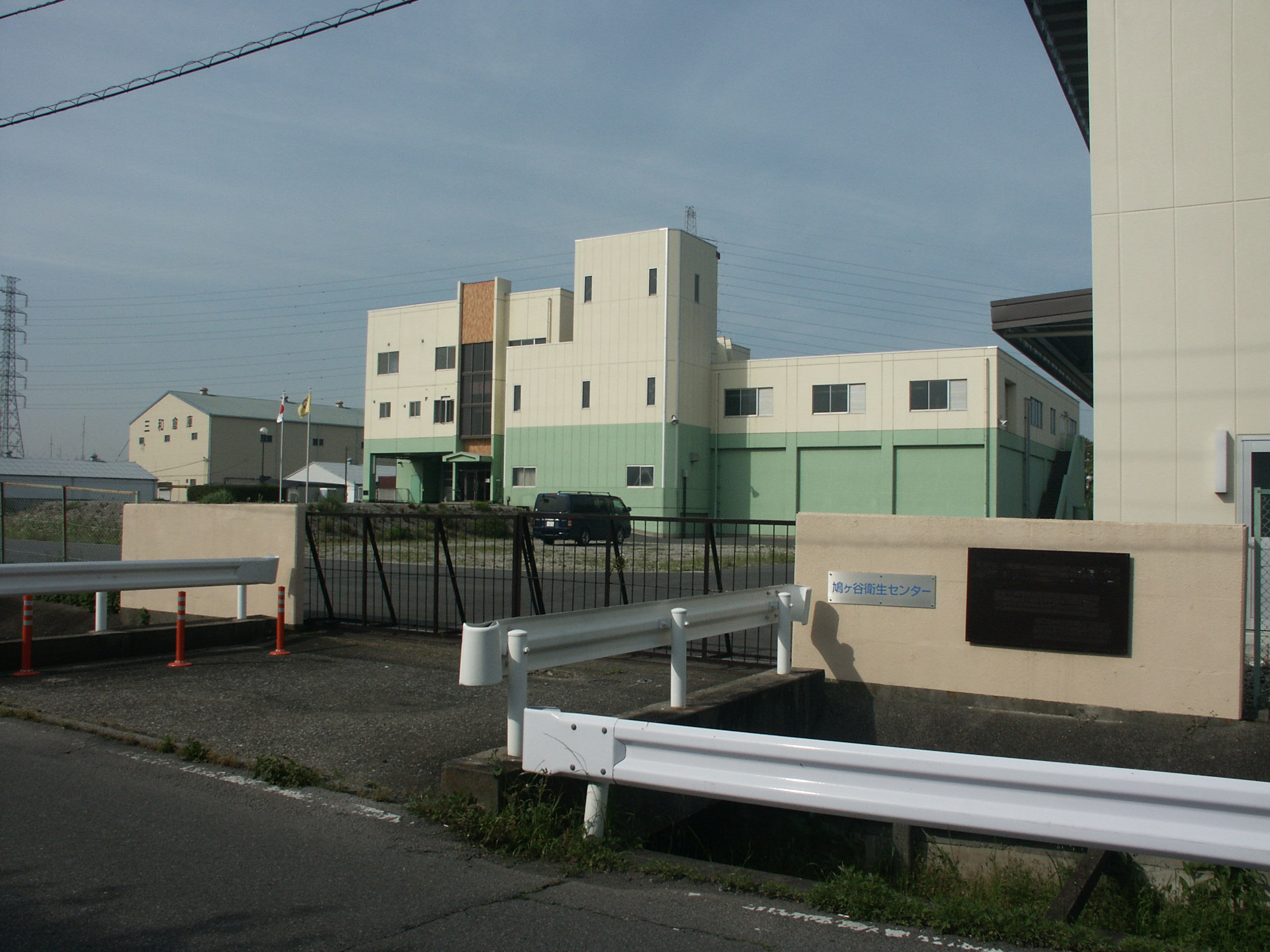 川口市鳩ヶ谷衛生センター（入口付近を撮影）